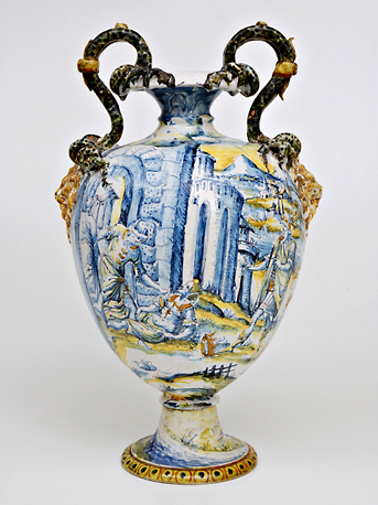 Vaso biansato. Leonardo Bettisi. Faenza XVI secolo.